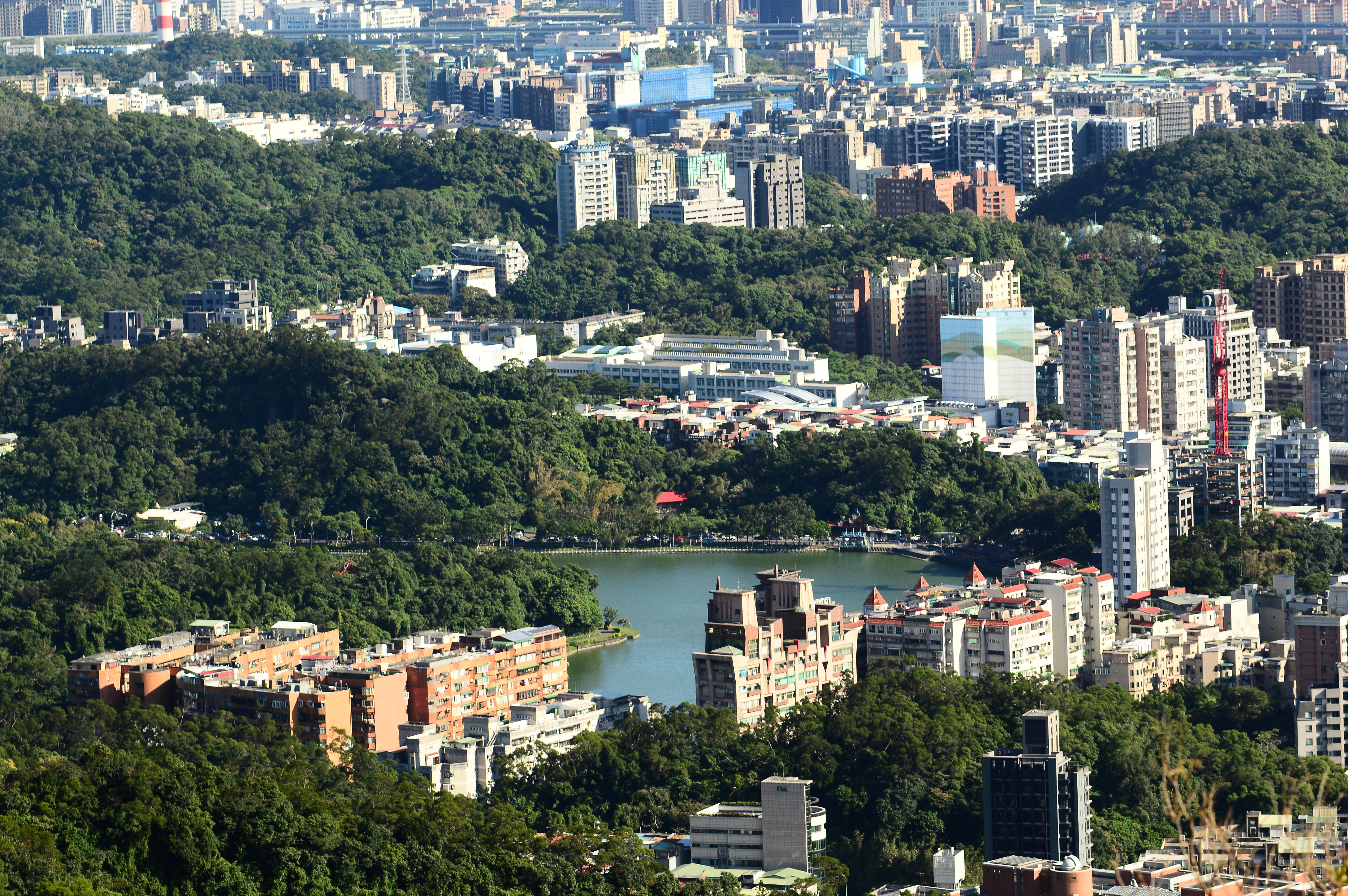 2016年碧湖公園